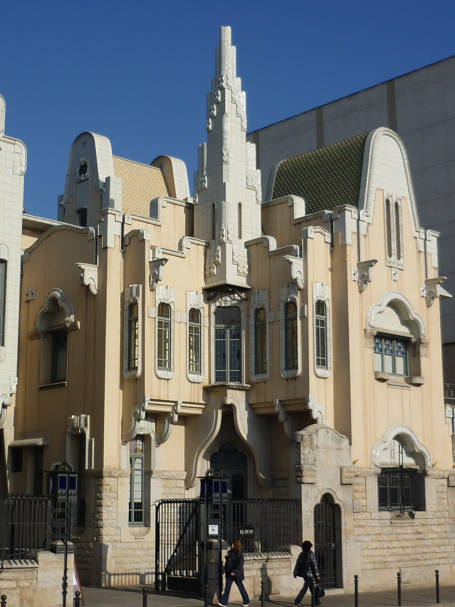 Conjunt industrial format per dos cossos